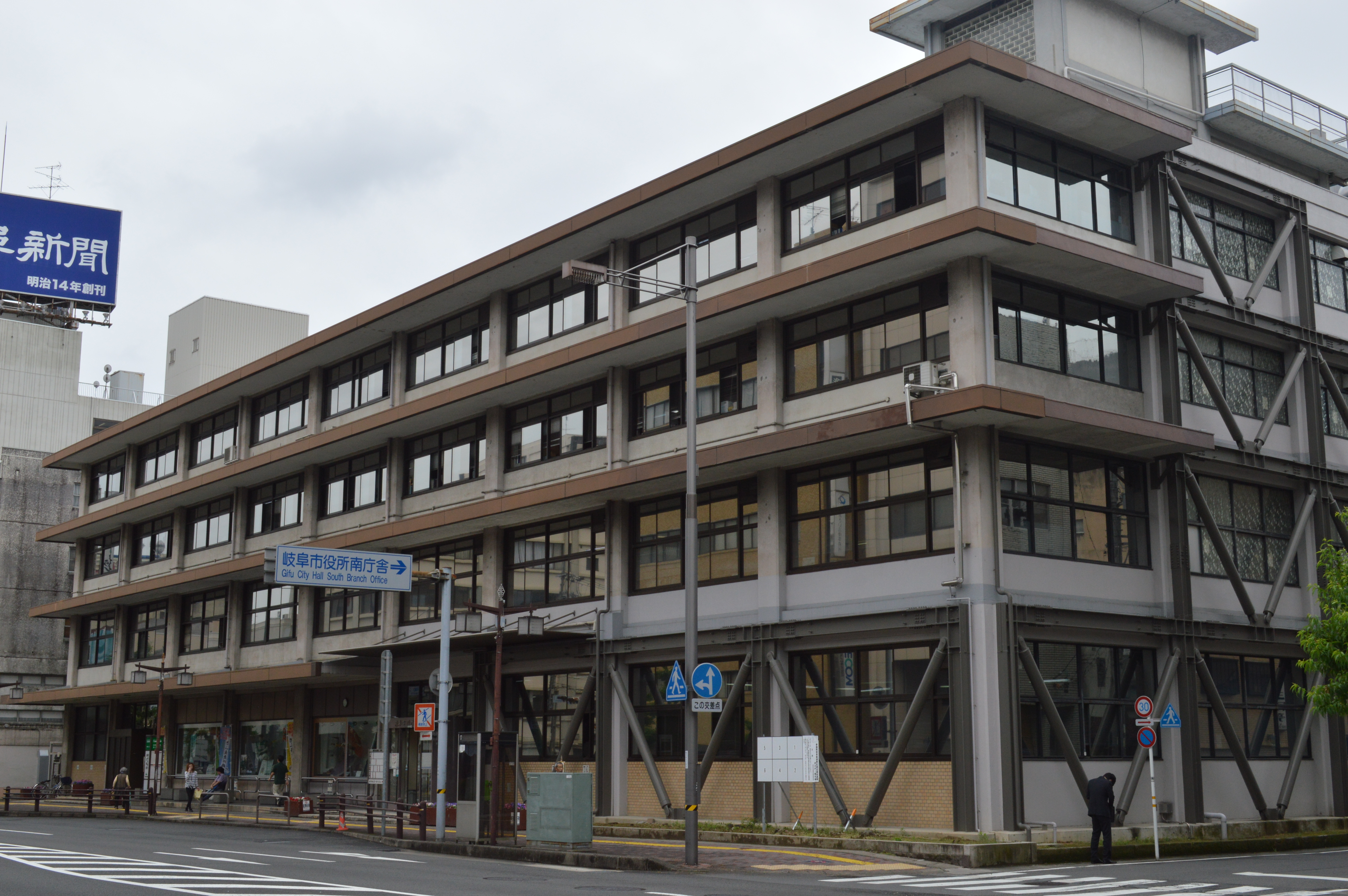 岐阜市役所南庁舎